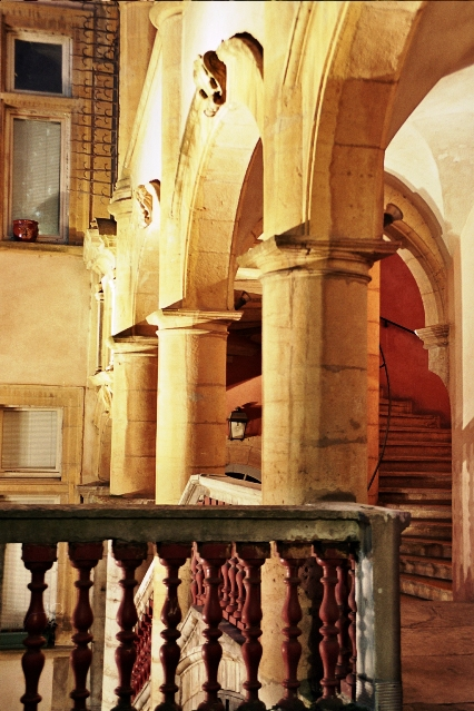 Une façade du Vieux Lyon, dans le quartier de Saint Paul.